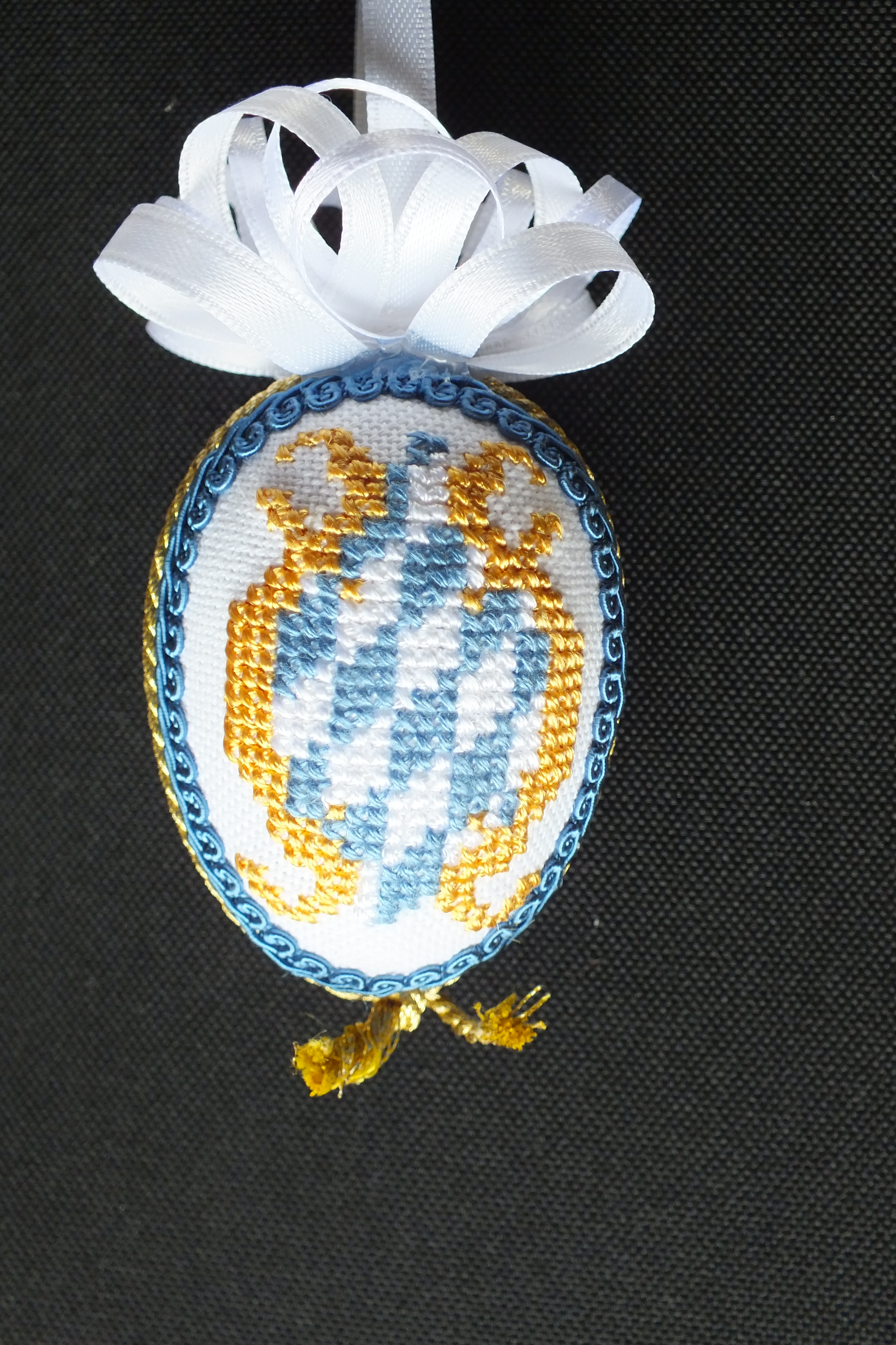 Bayerisches Wappen auf besticktem Osterei, Kreuzstich, Pfaffing, Oberbayern, 2016